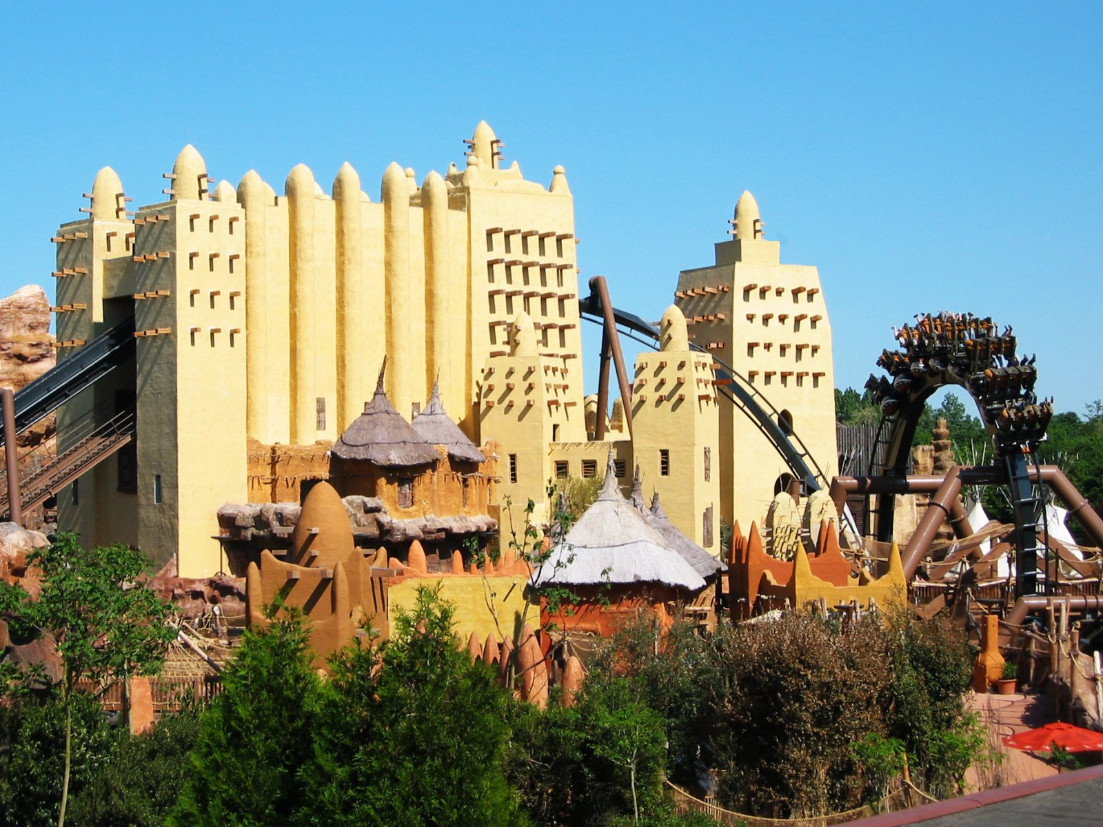 Deep in Africa overview